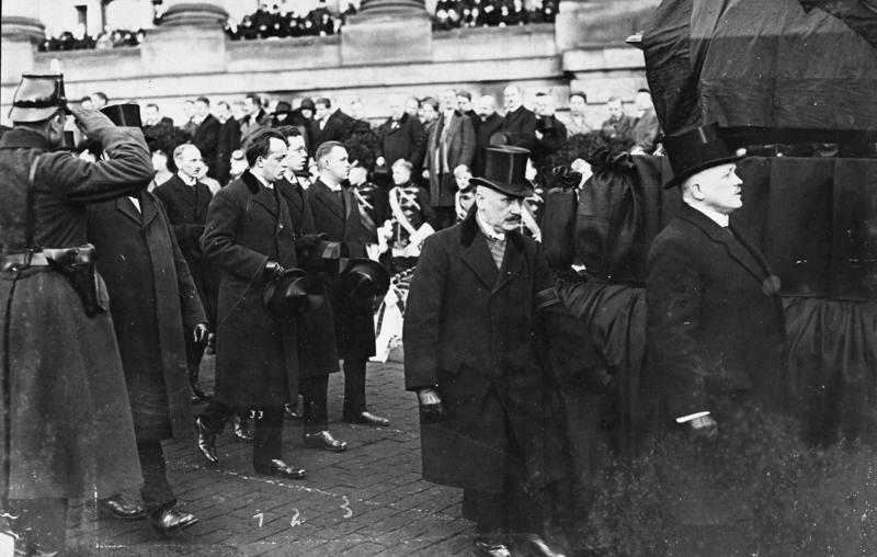 Berlin, Trauerzug für verstorbenen Friedrich Ebert Friedrich Ebert, der erste Reichspräsident geb.: 4.2.1871 in Heidelberg, gest.: 28.2.1925 in Berlin; SPD Politiker; wurde 1913 als Nachfolger Bebels zum Vorsitzenden der SPD gewählt; am 9.11.1918 wurde er Vorsitzender des Rates der Volksbeauftragten und am 11.1.1919 Reichspräsident. UBz: Trauerzug vor dem Reichstagsgebäude. Dem Sarg des verstorbenen Reichspräsidenten folgen seine Söhne Friedrich und Karl und sein Schwiegersohn Dr. Jänicke [richtig Wilhelm Jaenecke](v.l.n.r.) Abgebildete Personen: Ebert, Friedrich: Reichspräsident, Reichskanzler, Vorsitzender der SPD, Deutschland Ebert, Friedrich: Oberbürgermeister von Berlin, DDR